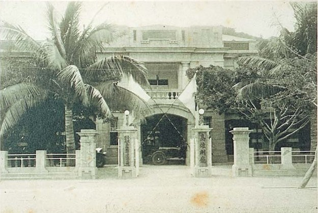 中文（台灣）: 裕仁太子入內參觀高雄州廳（今五福四路與鼓山一路交叉路底），座車則停在州廳大門口。